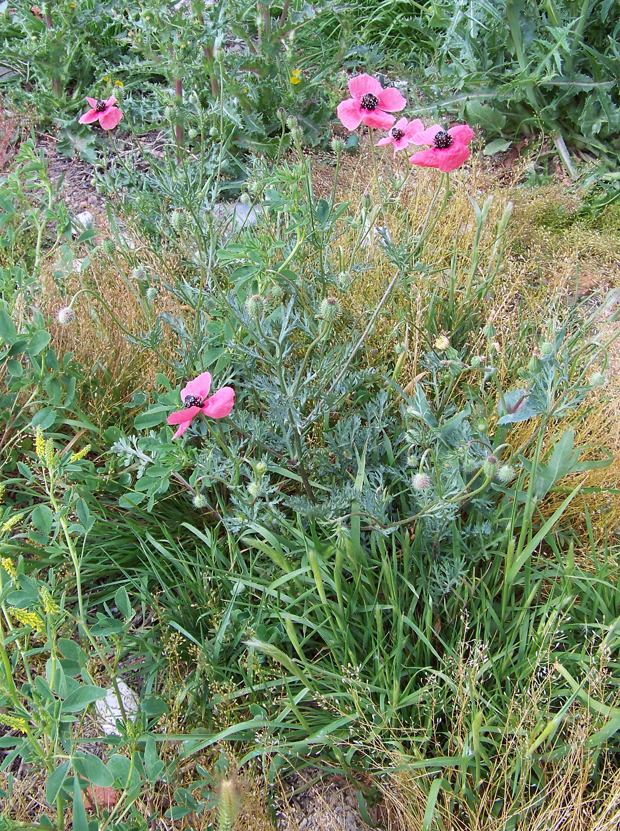 Papaver hybridum (Amapola triste) - Vista general, con flores en antesis (erectas) y preantesis (colgantes) y frutos hirsutos - Camino de la Azarbe de Patricio, Albatera (Provincia de Alicante, España).